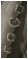 Foto van een zilveren lepel in mijn verzameling Keur van Amsterdam, Meesterteken J. Woortman, Leeuw voor zilver van tweede gehalte en jaarletter "K" uit de eerste Nederlandse serie wat voor 1819 staat. Eigen foto Robert Prummel